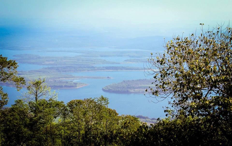 Trên núi Bà Rá nhìn xuống